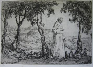 Cäcilie Graf-Pfaff Franziskus Vogelpredigt um 1926